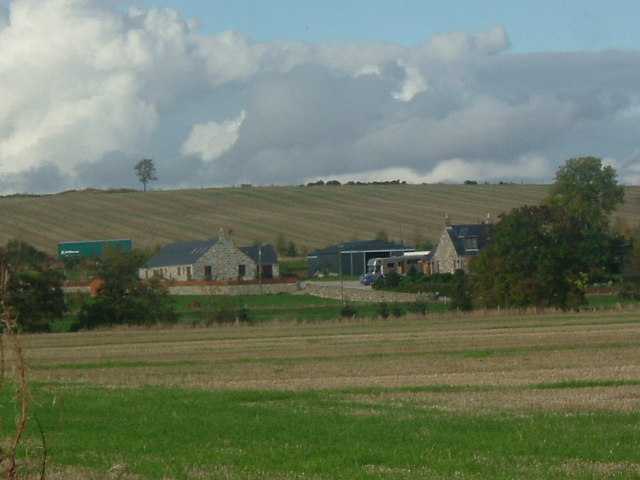 Dockenwell farm, by Sauchen, Aberdeenshire